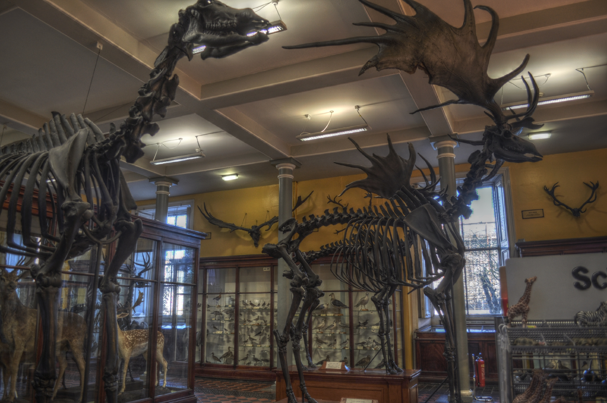 Camera: Nikon D5000 3 exposures: -2, 0, 2 EV Luminance HDR, Mantiuk'06